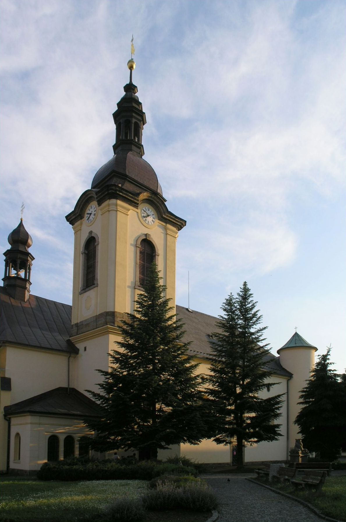 Rumburk 1 - kostel sv. Bartoloměje